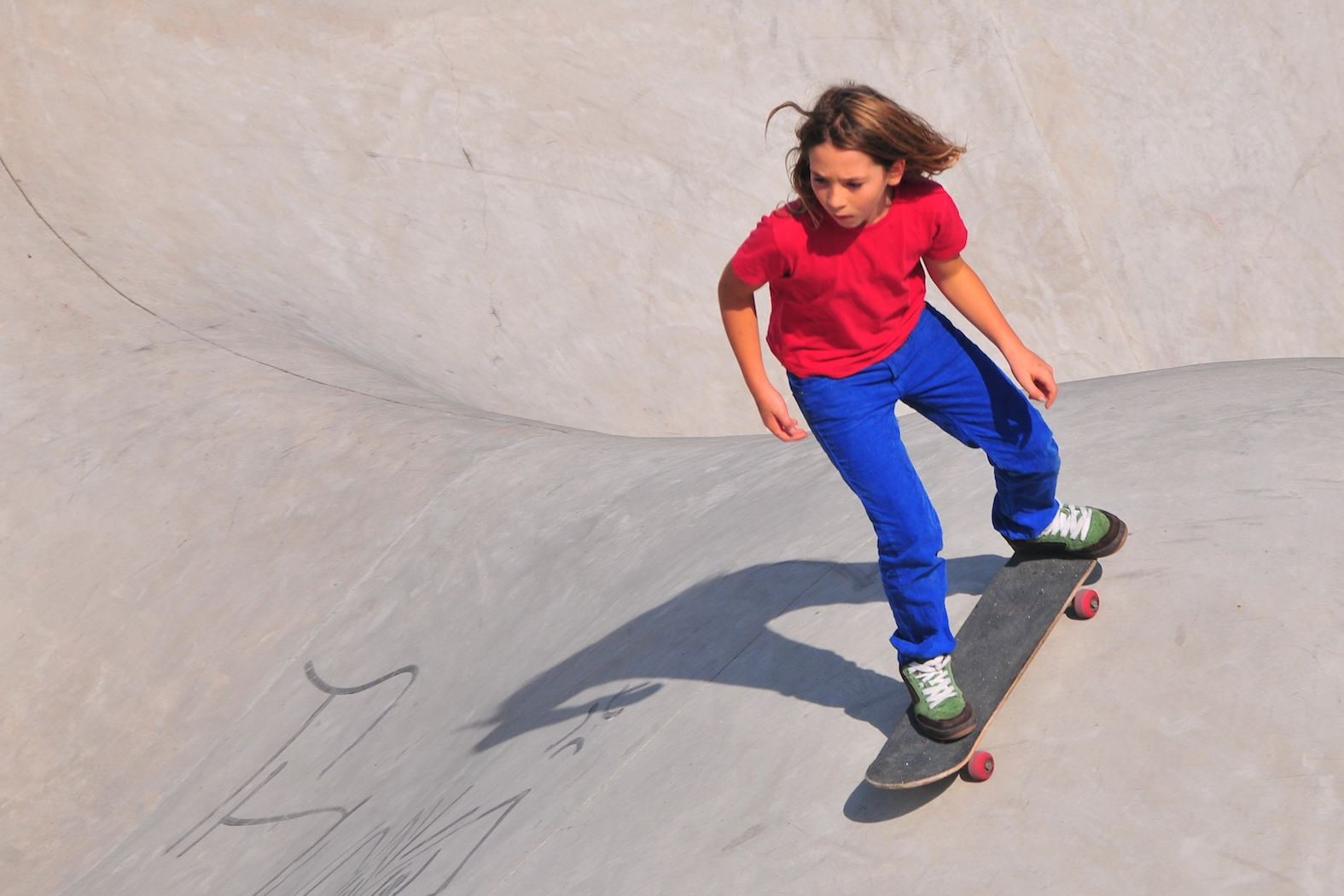 Skater Girl - Park Spoor Noord.